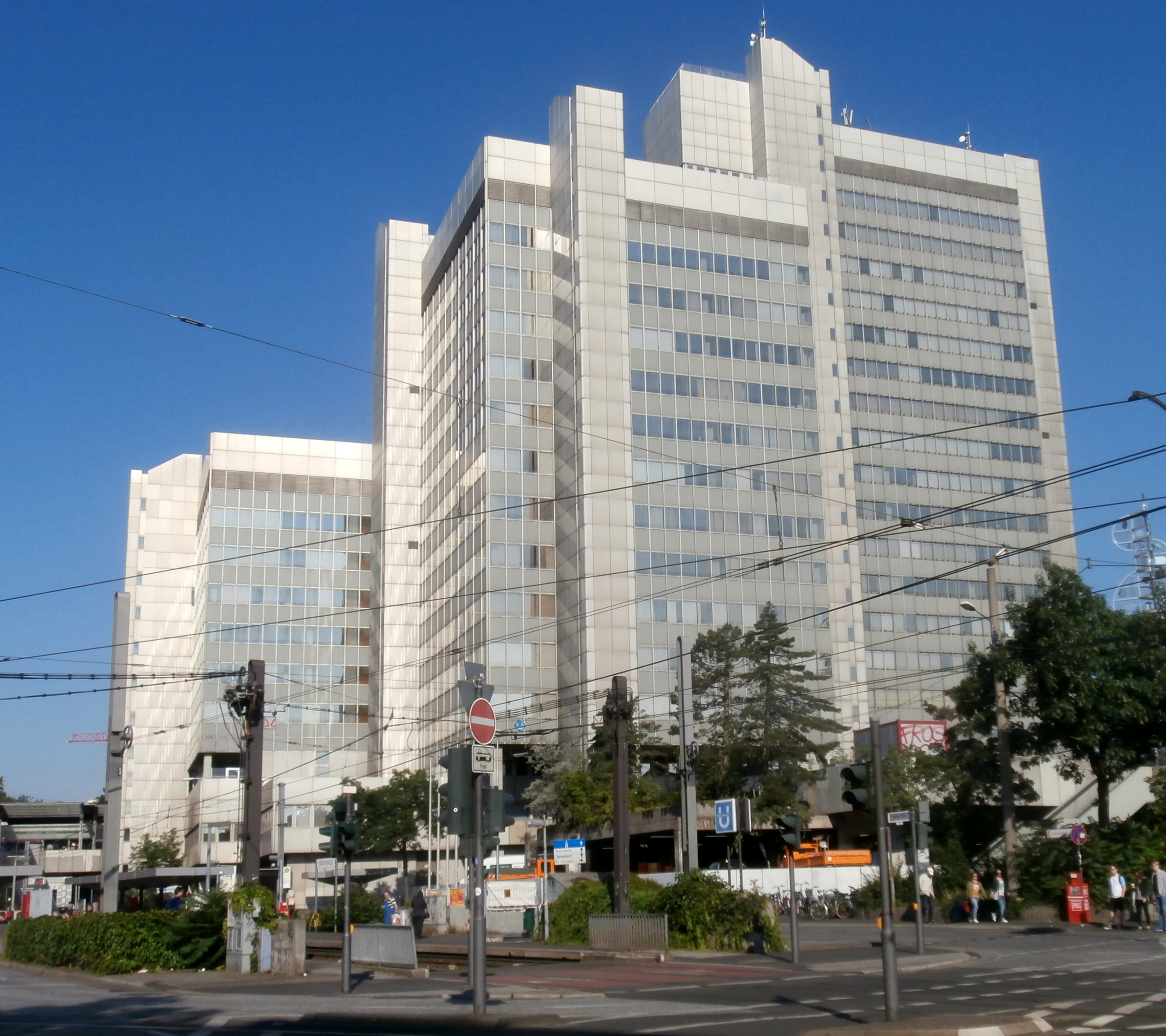 Stadthaus, Bonn: Aufnahme während der zweiten Phase der Demontage der Vorhangplatten von Juni bis August 2014